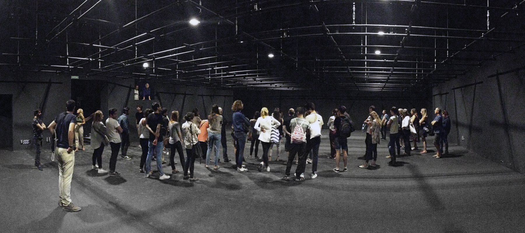 Sala inferior principal de la Sala Beckett en el barrio de Pueblonuevo.